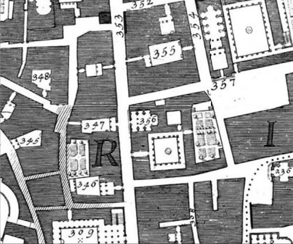 Pianta di Nolli